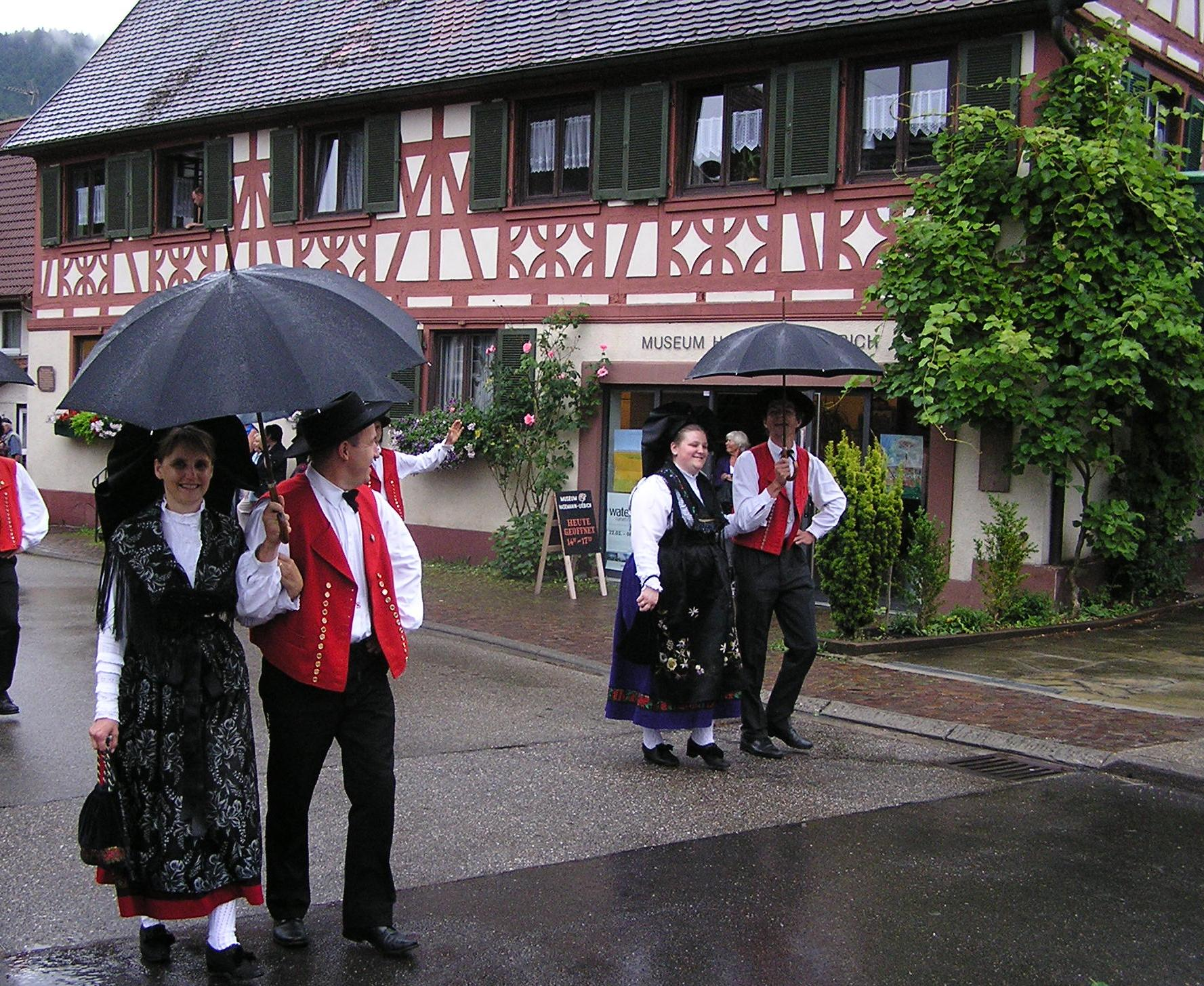 77793 Gutach (Schwarzwaldbahn), Kirchstraße 4. Das Krämerhaus wurde 1789 erbaut. Das Haus liegt in der Ortsmitte nahe der Kirche. Es ist hervorragend herausgeputzt und hat eine neue Bestimmung erhalten. Seit 2005 hat der Kunstverein das Haus zum Kunstmuseum Hasemann-Liebich umgebaut. Seither gibt es jährlich mehrere wechselnde Ausstellungen der Gutacher Malerkolonie und anderer Künstler.